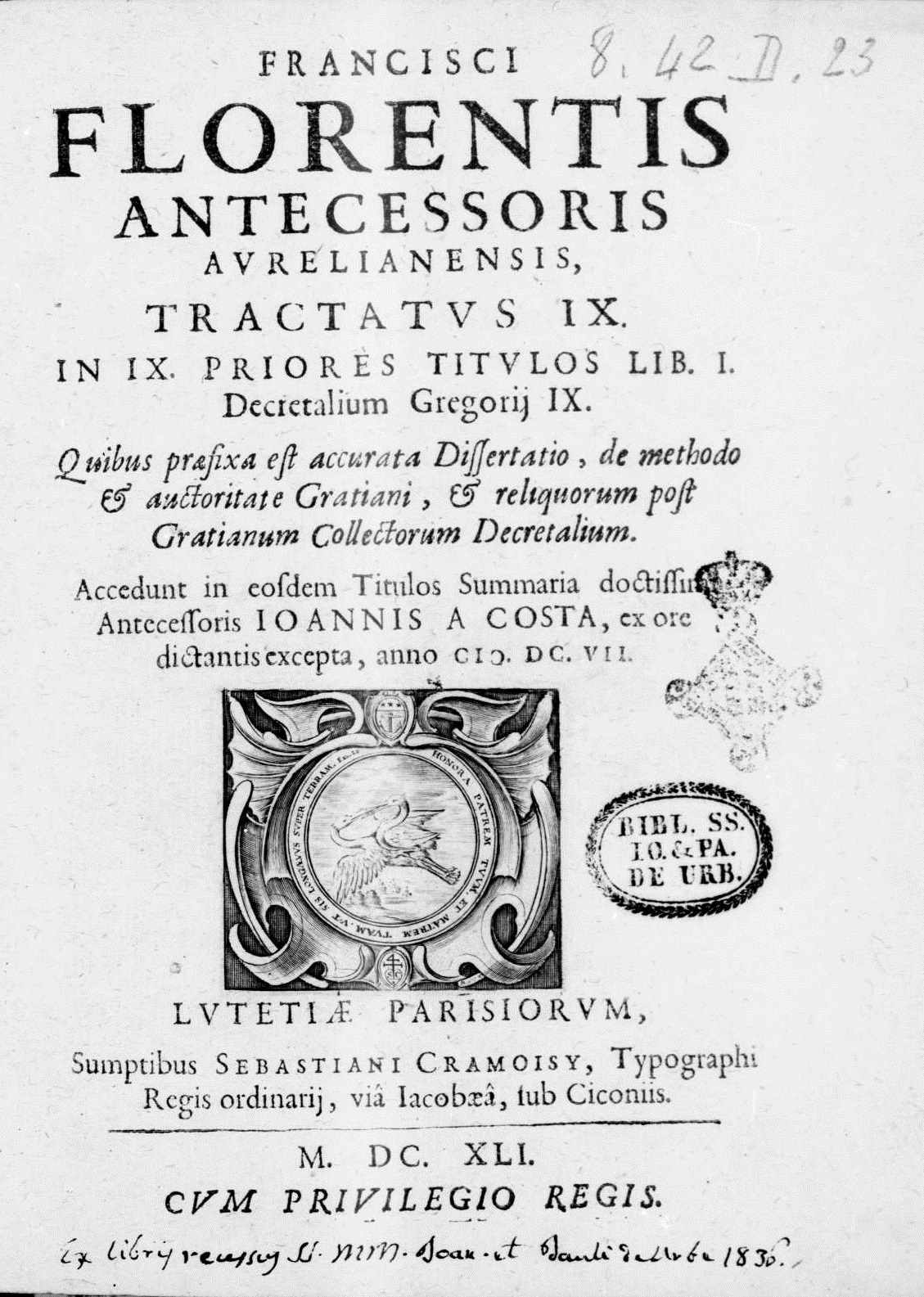 Frontespizio